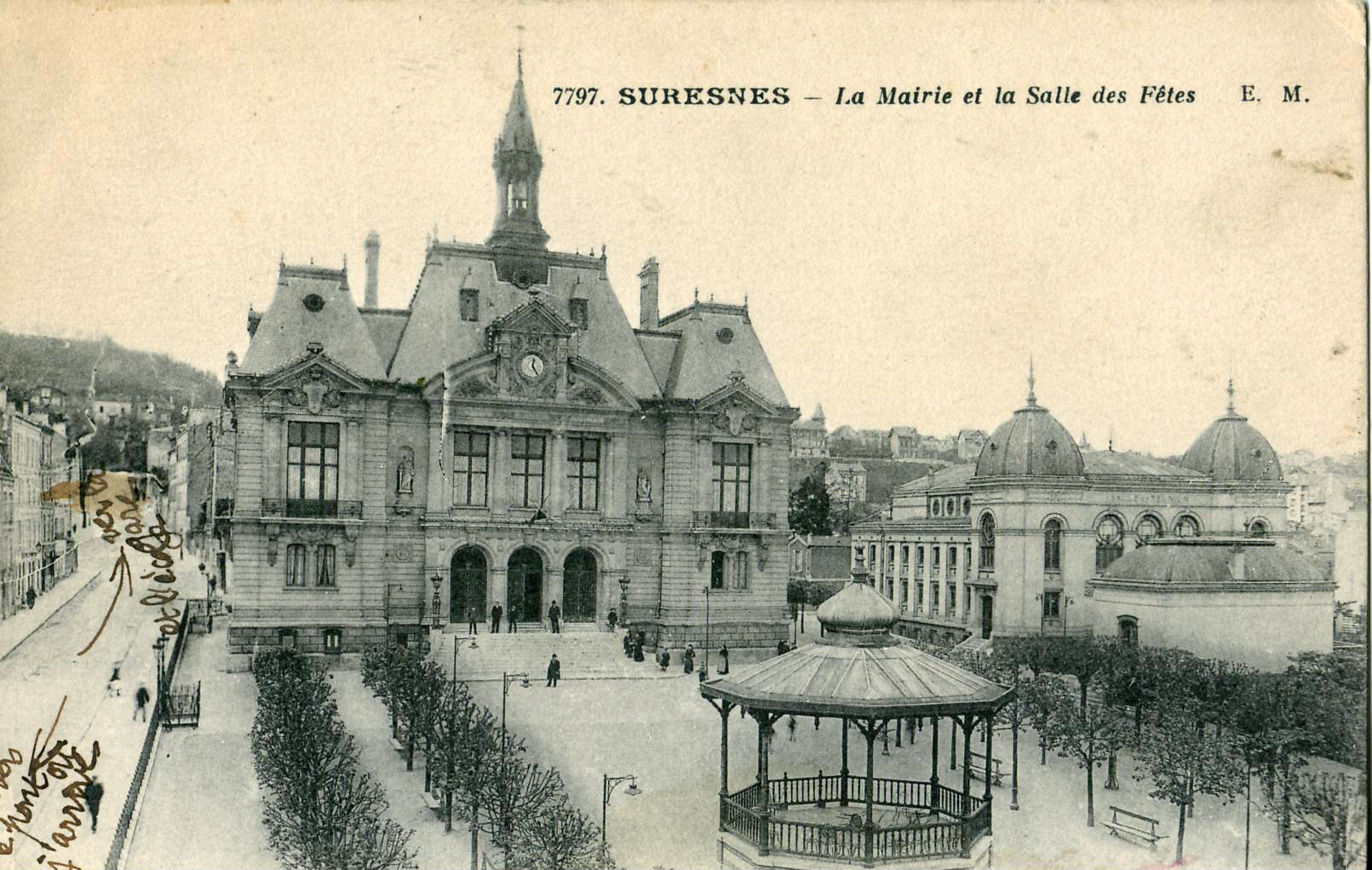 Carte postale ancienne éditée par EM n°7797 :SURESNES - La Mairie et la Salle des Fêtes